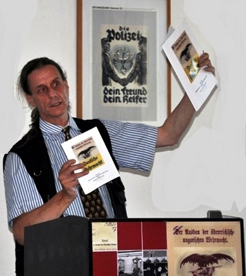 Herbert Gantschacher bei der Ausstellungseröffnung "Von der k.u.k. Wehrmacht in die deutsche Wehrmacht" im Dokumentationszentrum Prora auf der Insel Rügen, Deutschland